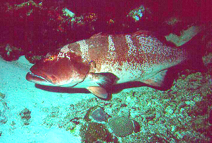 Leoparden-Zackenbarsch